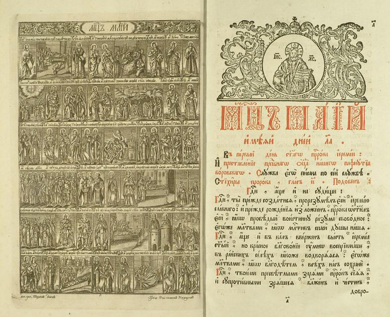 Минея служебная. Май.